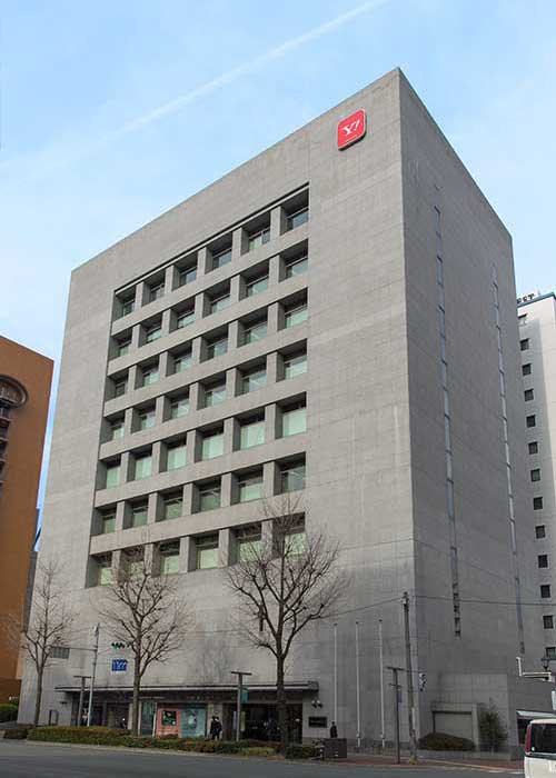 ワイジェイカード本社